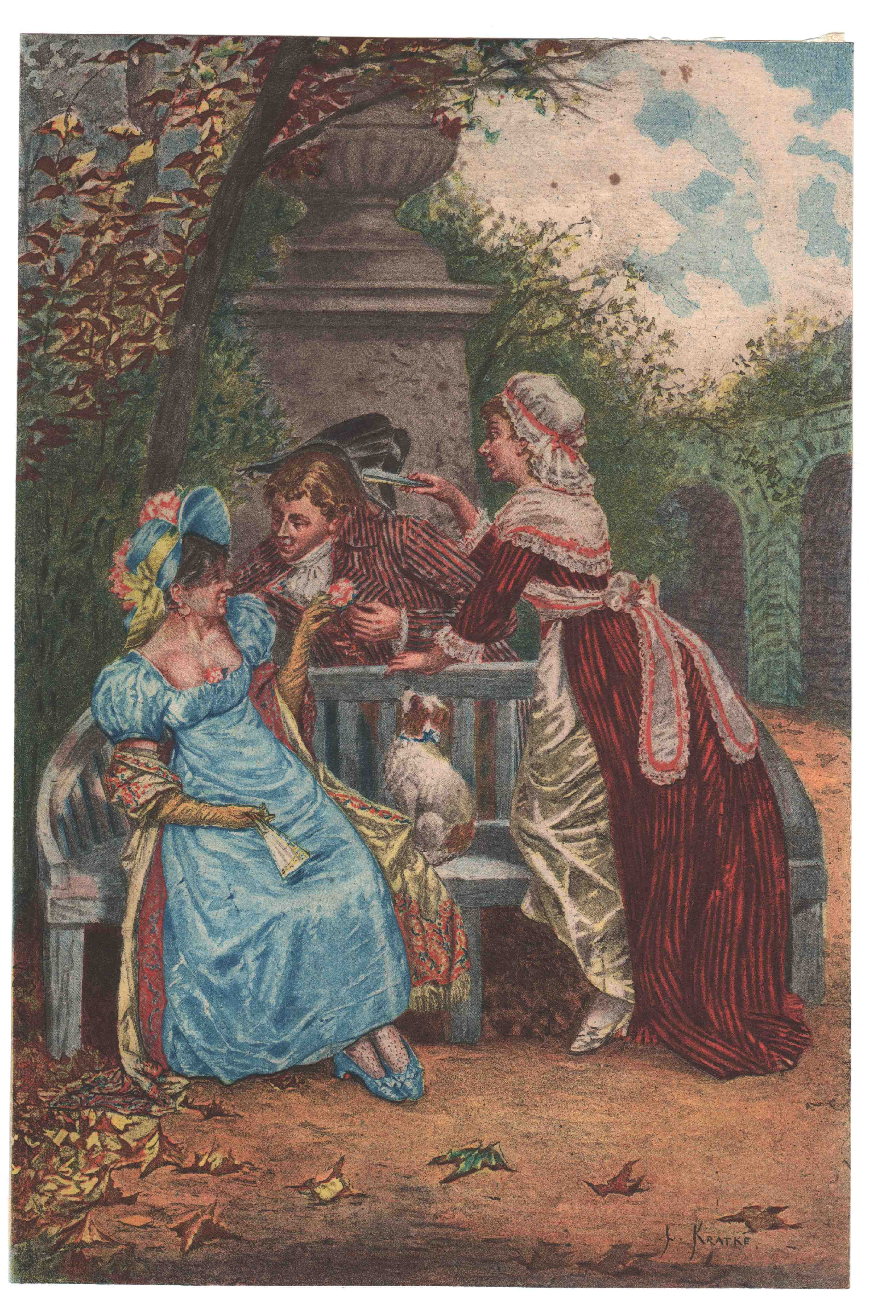 Illustration du livre d'Octave Uzanne, Son altesse la femme. Hors texte face à la page 172